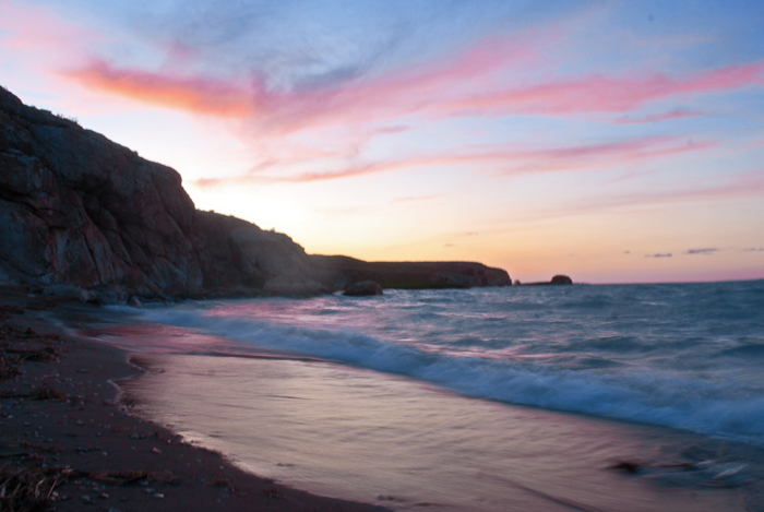 Балхаш